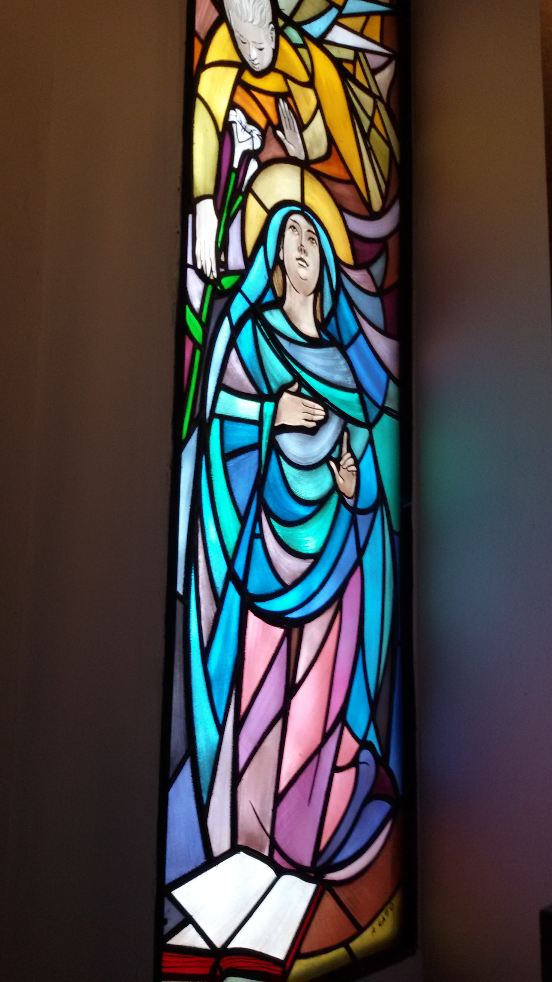 Chiesa di Santa Cristina Quinto di Treviso